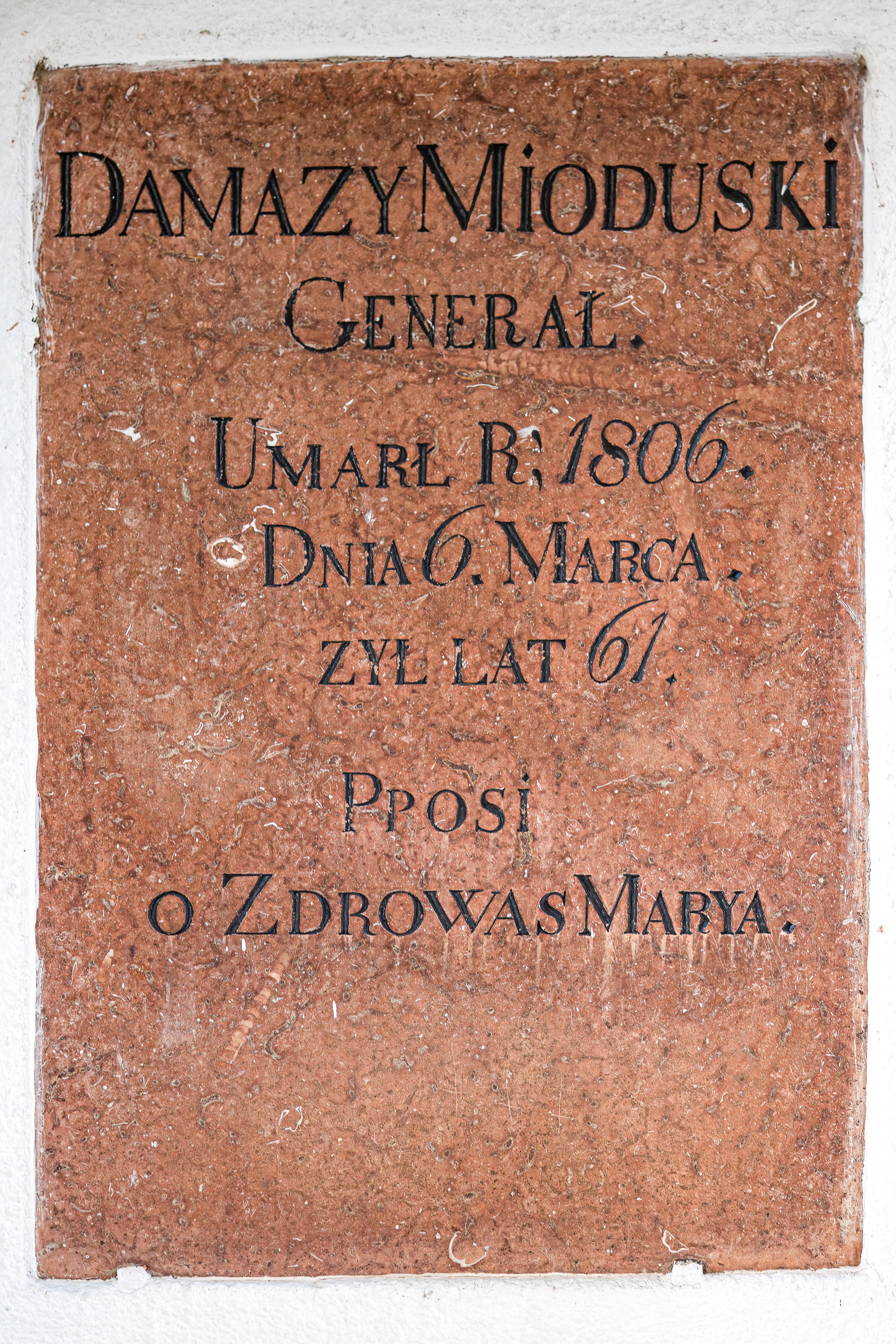 Epitafium Damazego Mioduskiego na fasadzie Kościoła Matki Bożej Bolesnej, klasztoru karmelitańskiego sanktuarium maryjnego w Oborach